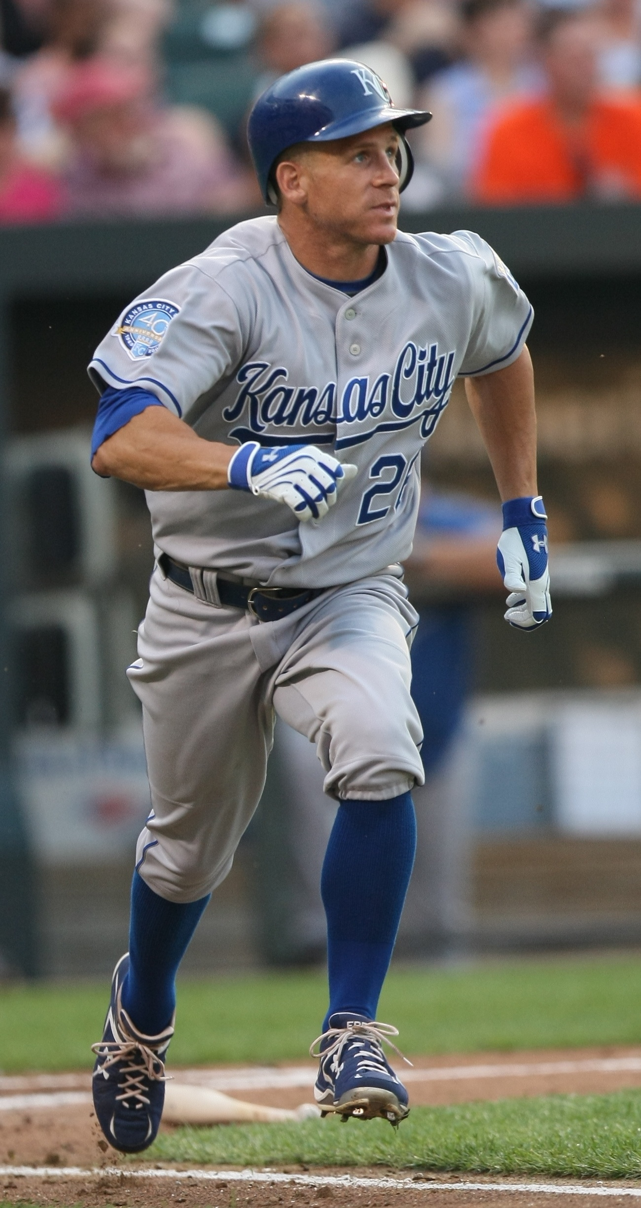 Ryan Freel